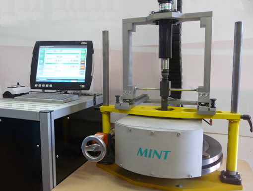 Messwagen gemäß VDI-2649